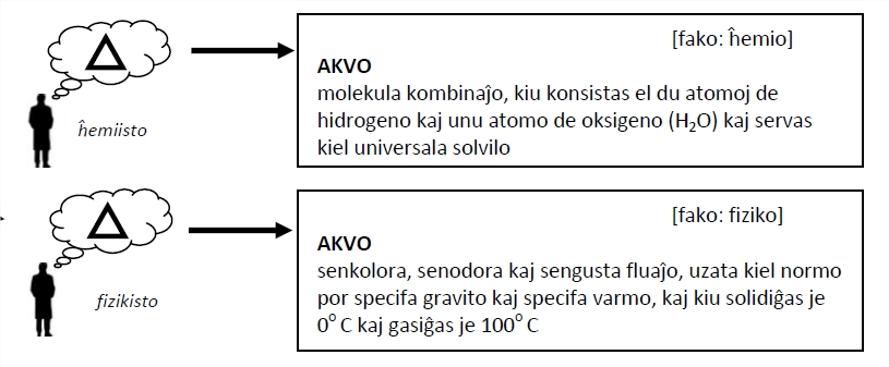 Sama realo vidata de du kompetentuloj pri malsimilaj fakoj.